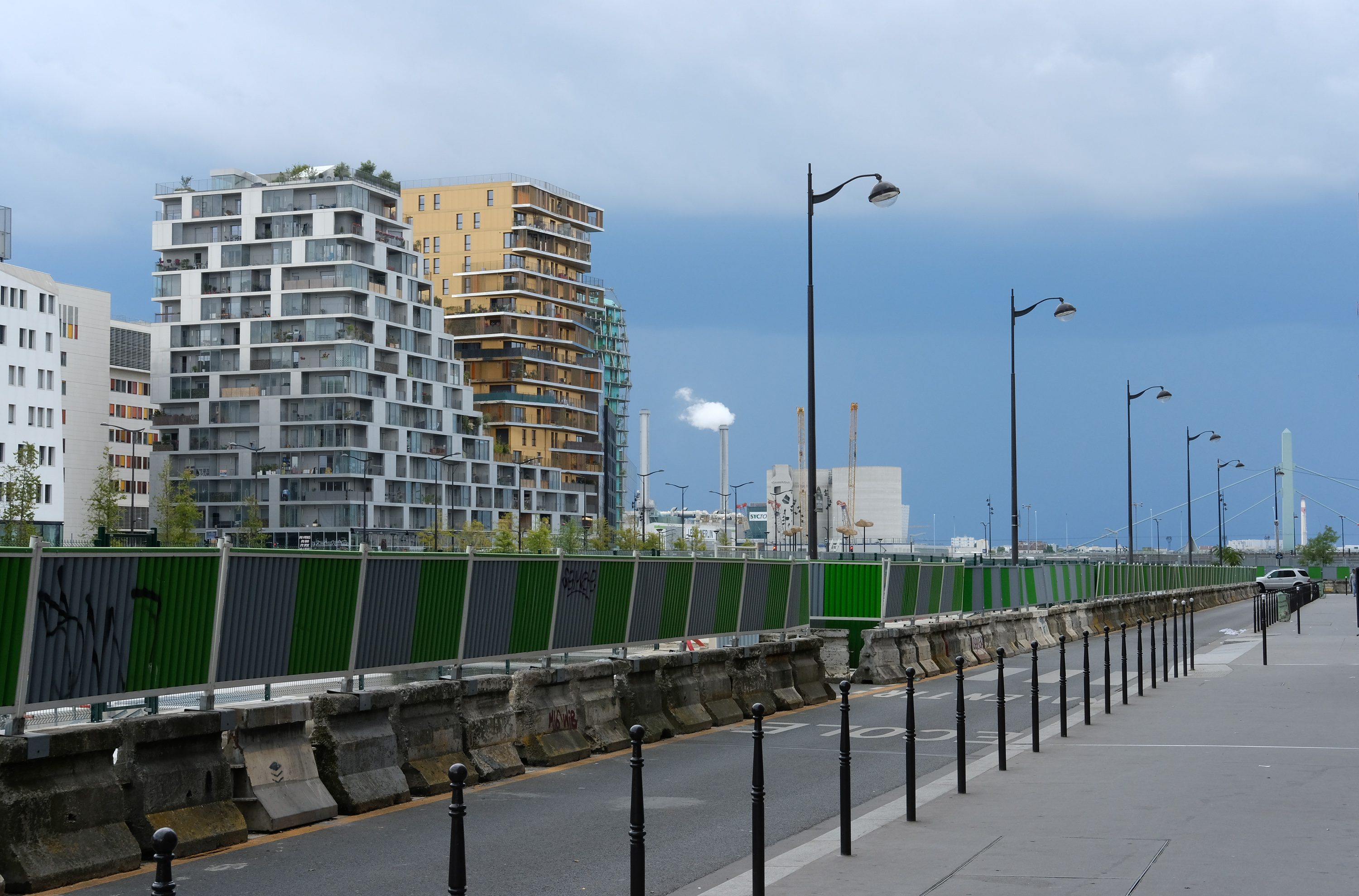 Rue Jeanne-Chauvin - Paris XIII